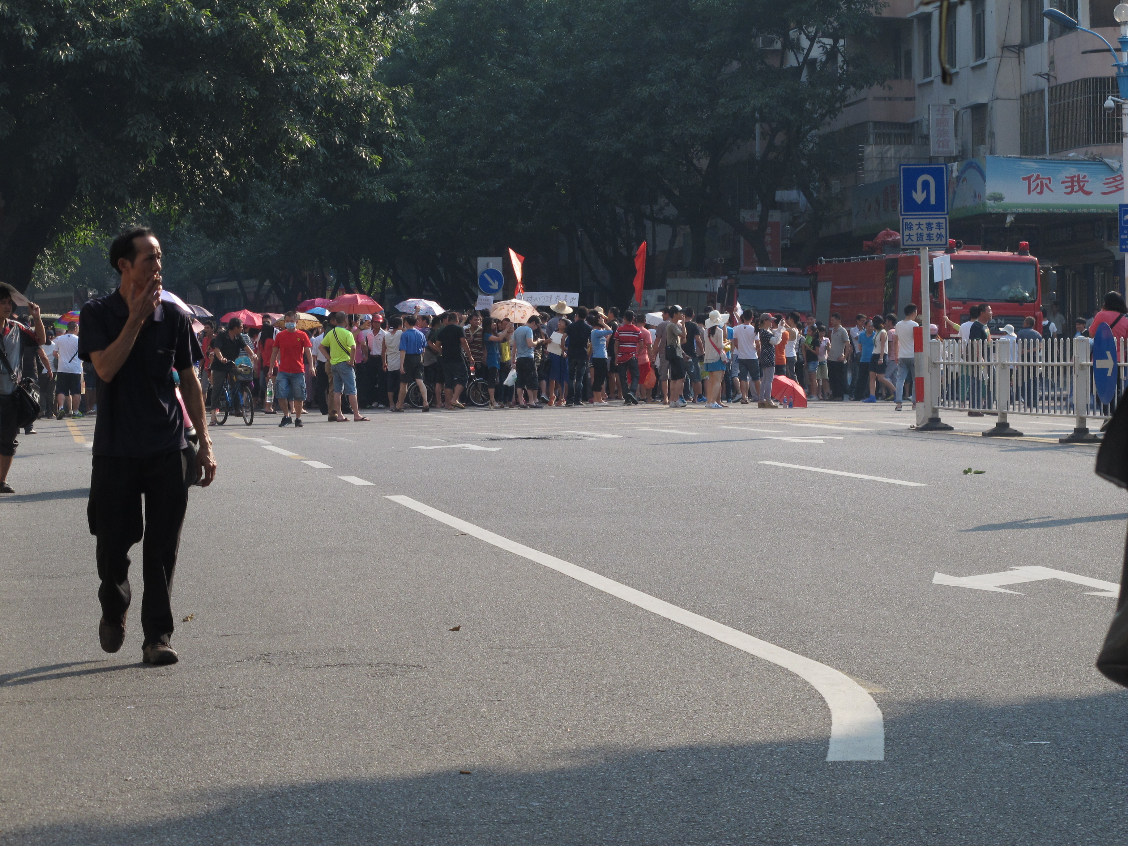 中文（中国大陆）: 反核抗议游行期间,白沙大道中被全线封闭,车辆绕行胜利路,华园中路